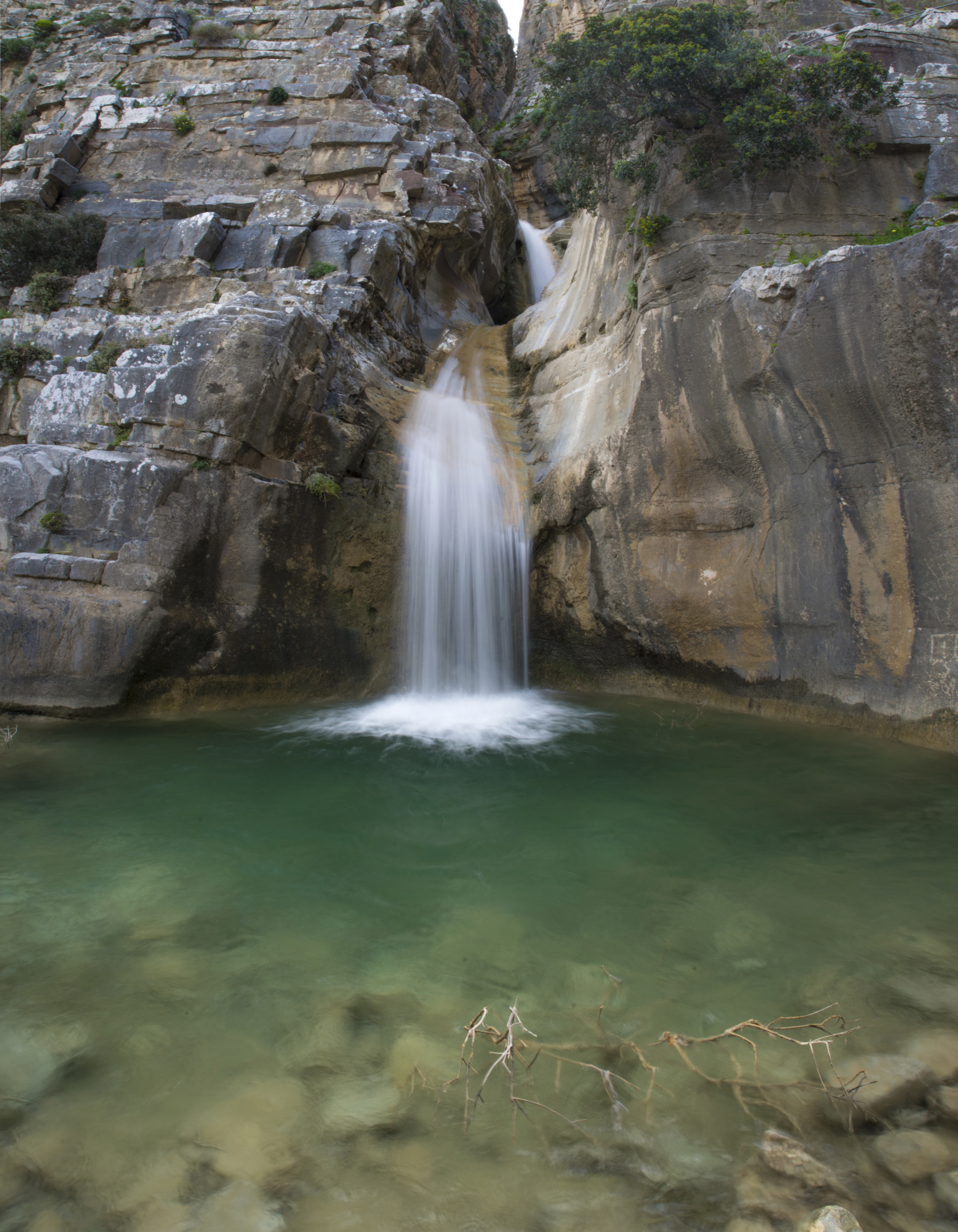 Καταρράκτης στο φαράγγι Χα This is a photography of Natura 2000 protected area with ID GR4320005